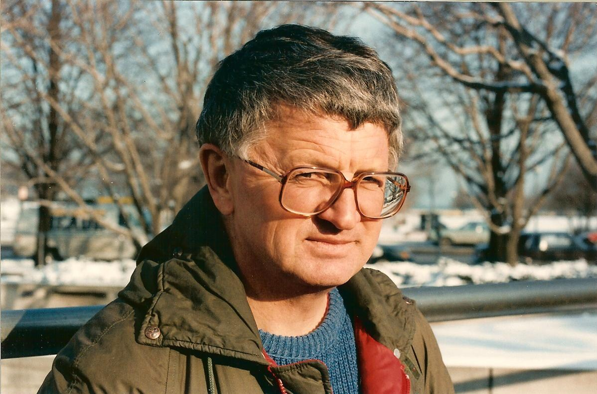 Стив Тешић испред Гудмен театра у Чикагу, 1991. Фотографија је направљена током интервјуа Дејана Стојановића са Стивом Тешићем.